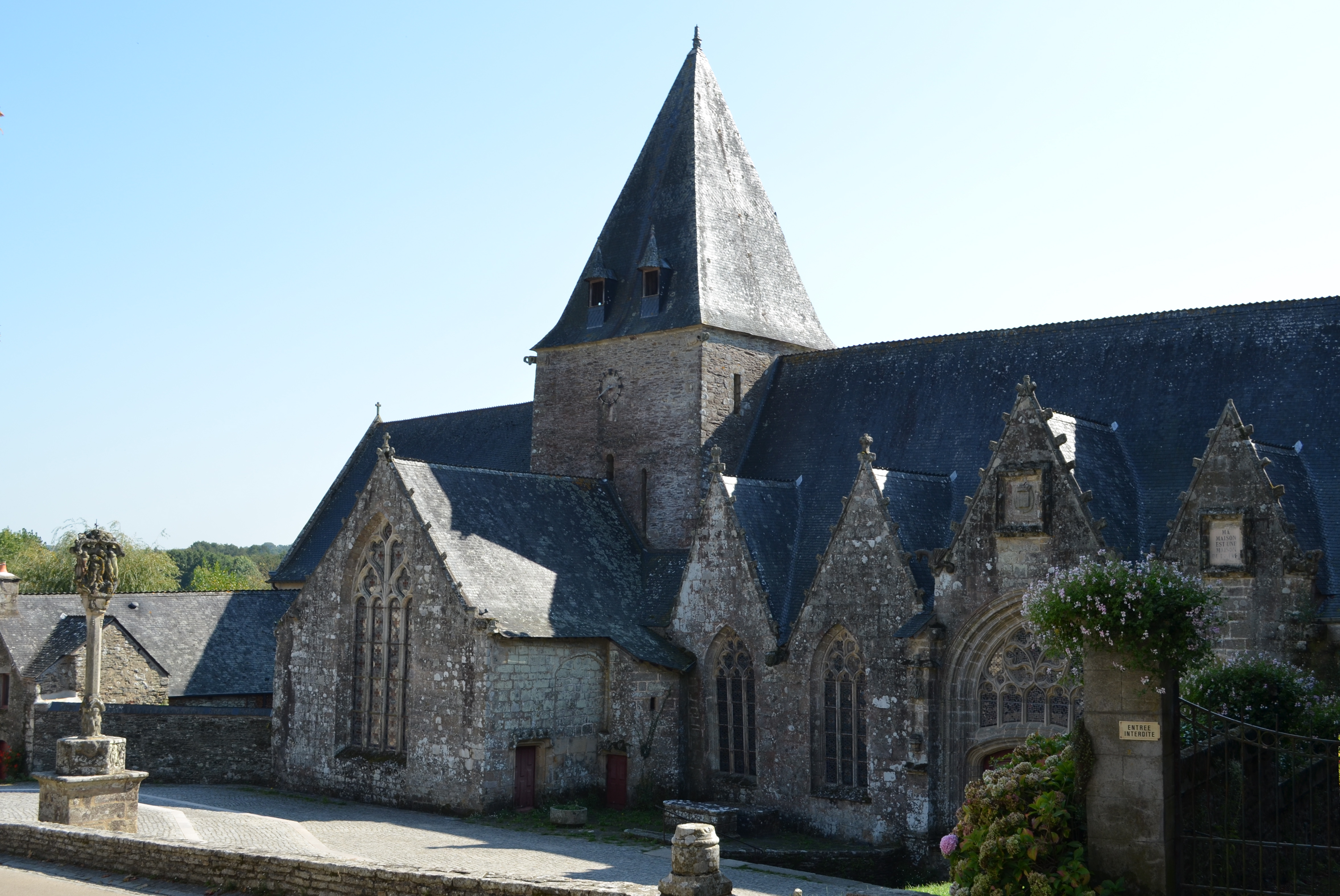 Église Notre-Dame-de-la-Tronchaye (15e s. - 17e s.) - Rochefort-en-Terre (Morbihan) .